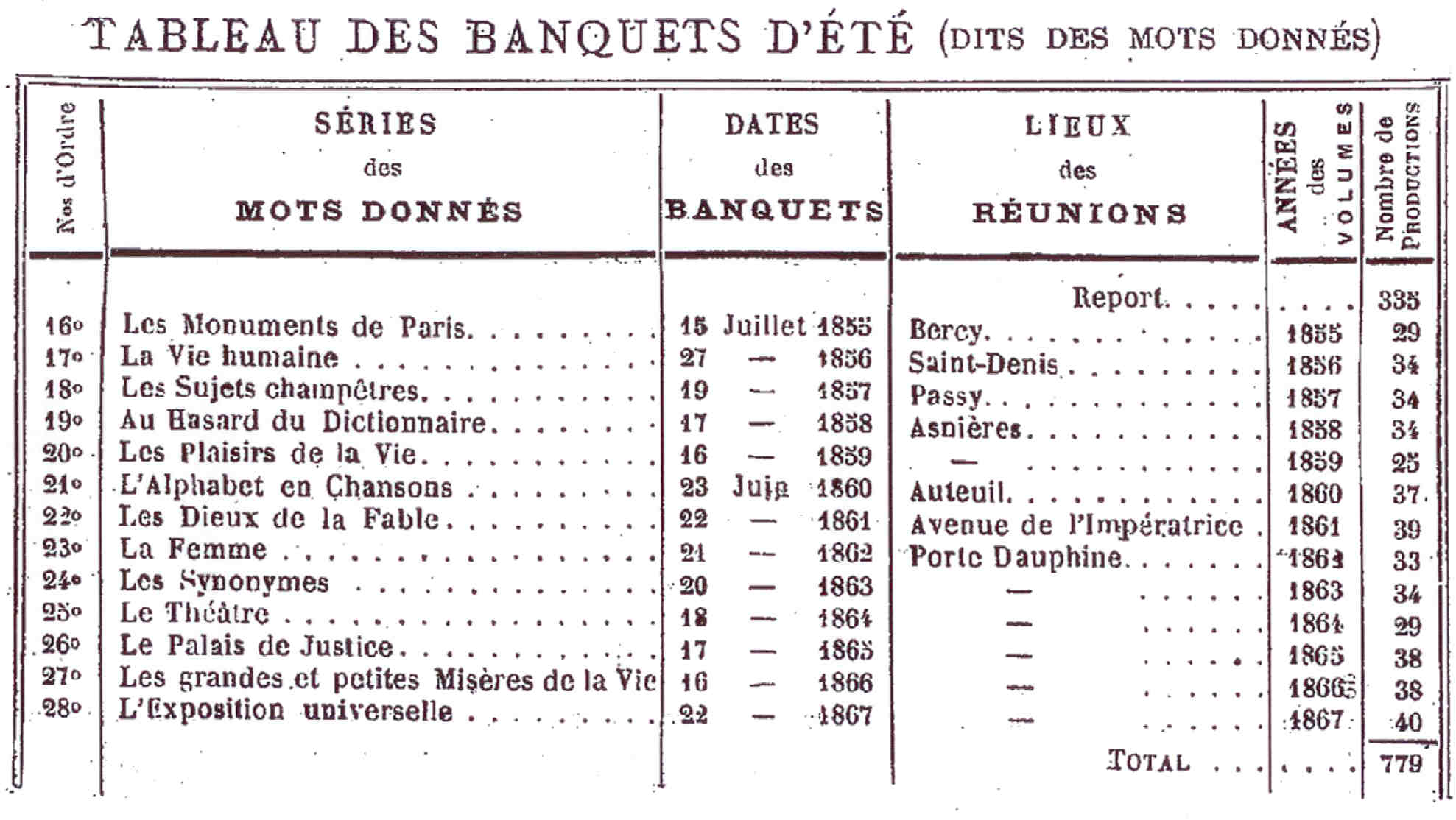 Table des banquets d'été du Caveau, 2ème page.